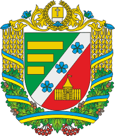 Герб Брусилівського району